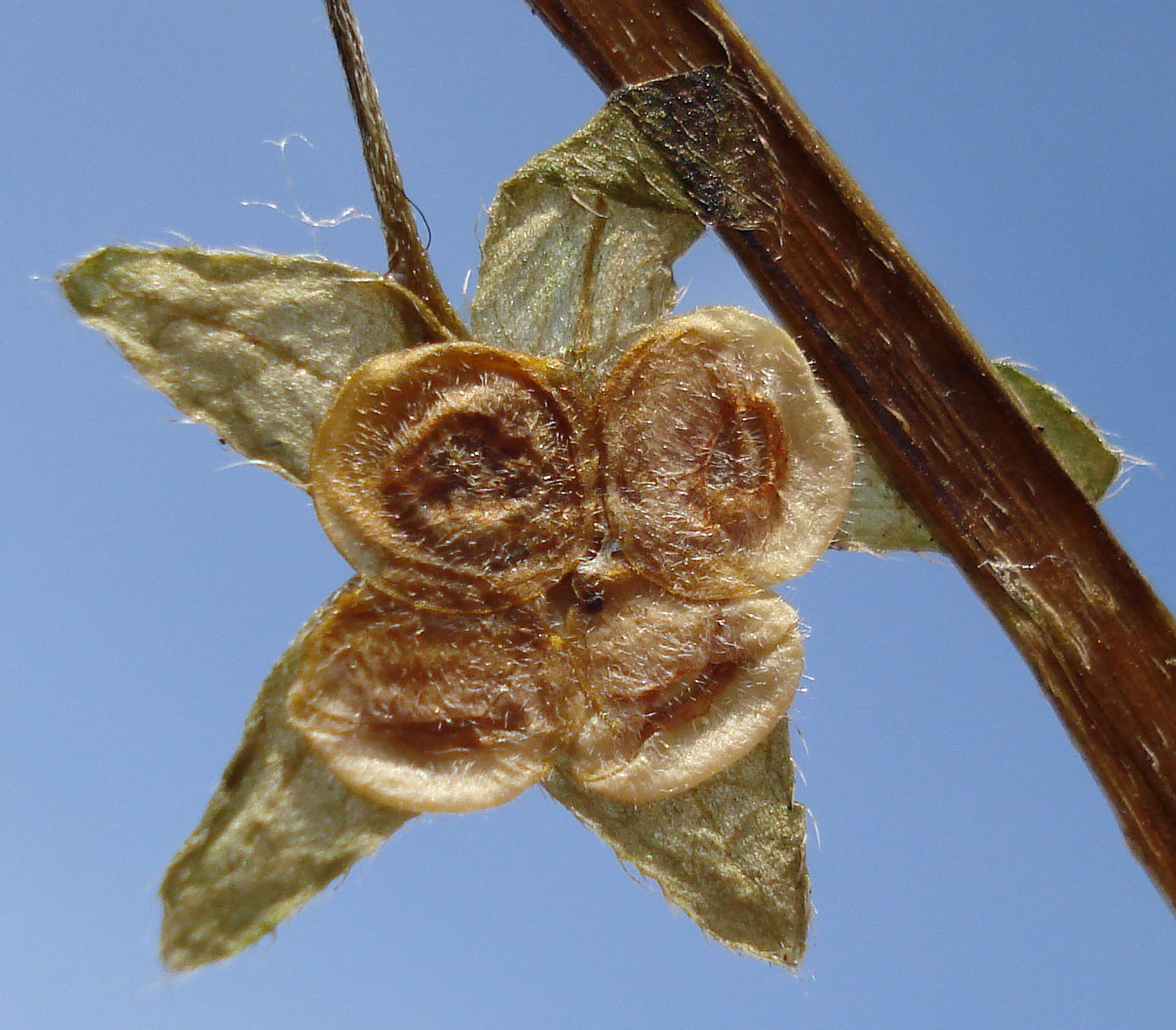 Omphalodes scorpioides (reife Früchtchen)